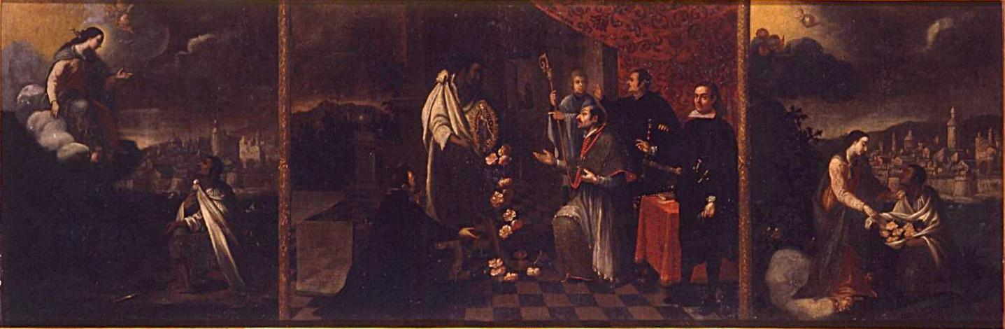 La obra representa diversas apariciones de la Virgen de Guadalupe, que tiene su santuario en el monasterio de Guadalupe.